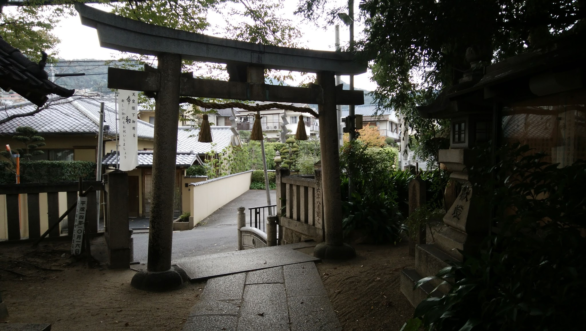 三条八幡神社の境内から撮影した鳥居